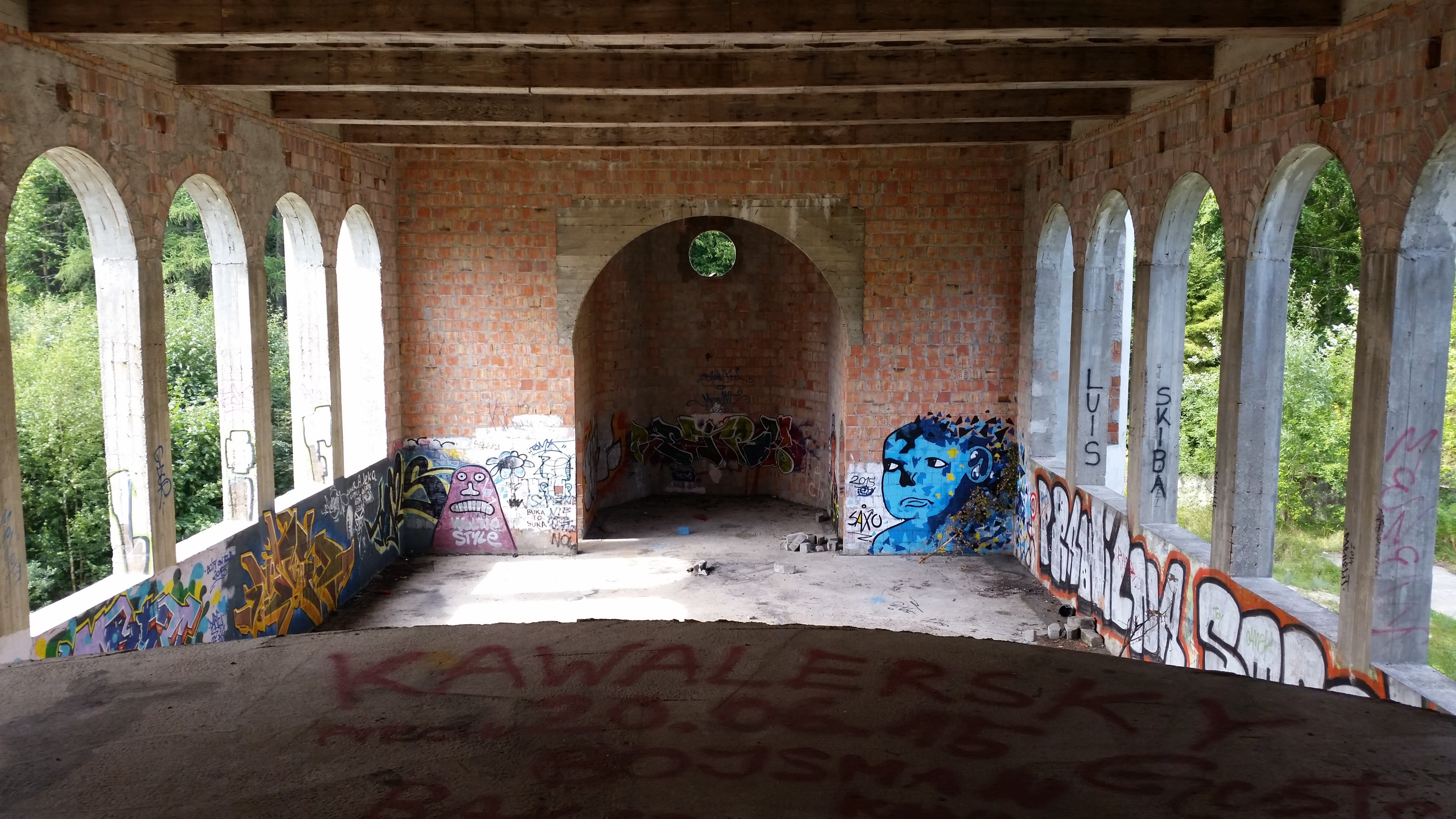 Widok na zamek w Łapalicach